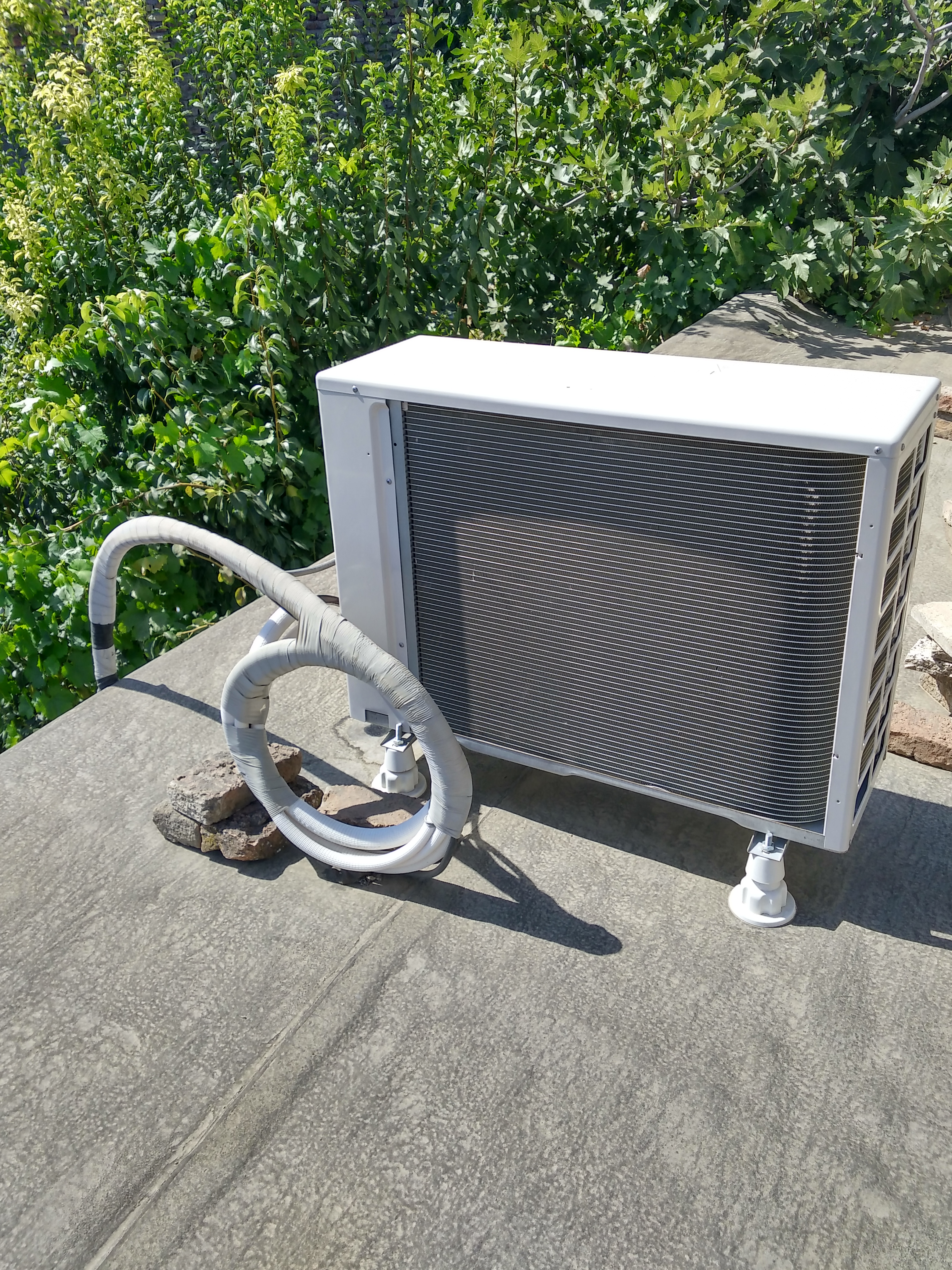 موتر یک کولز گازی در شمال.